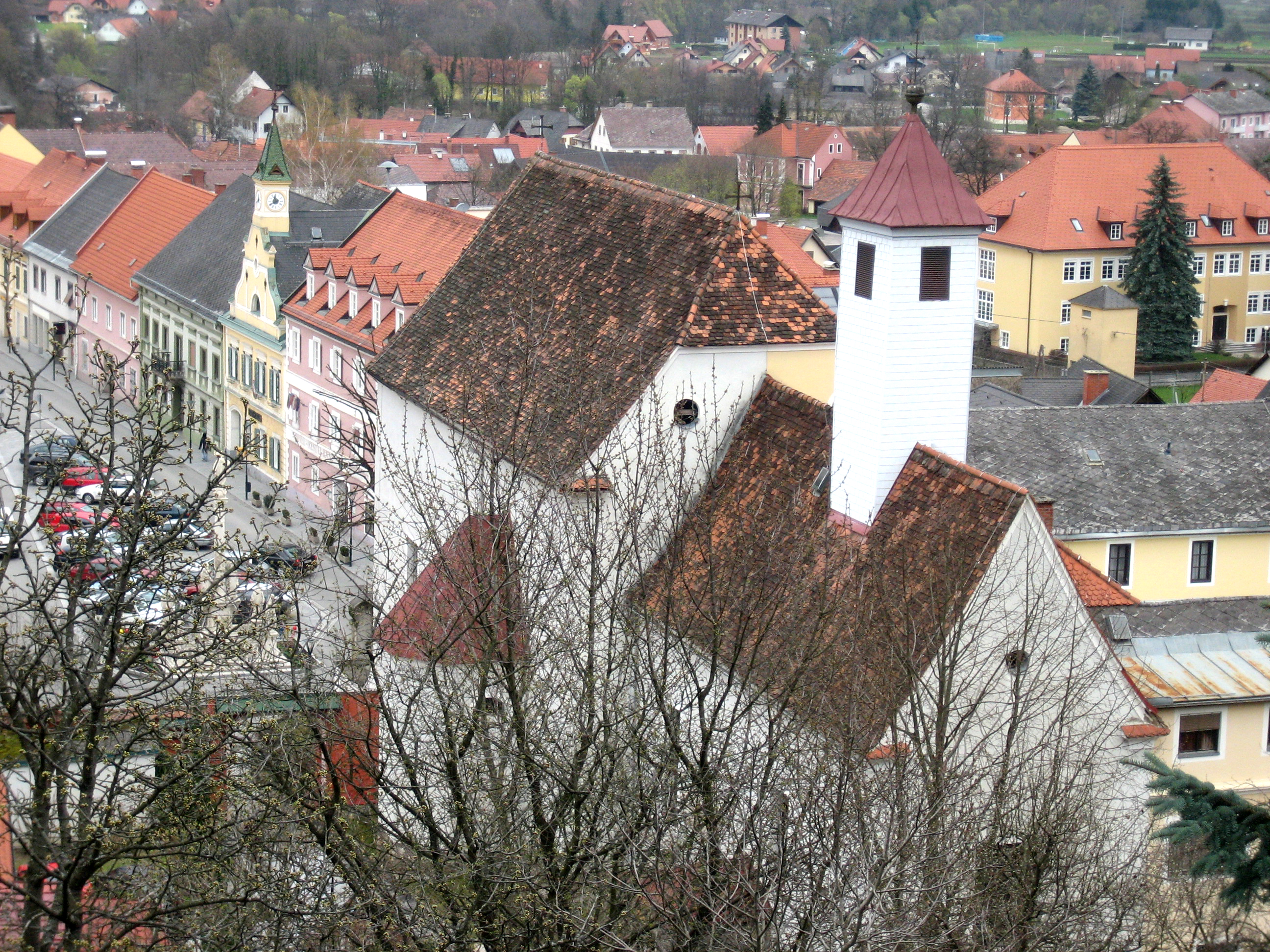 ehemalige Kapuzinerkirche Hl. Schutzengel